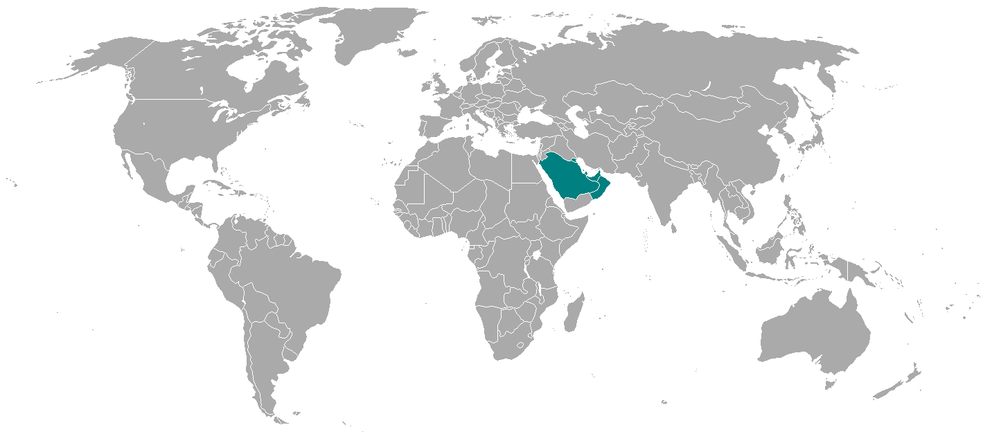 GCC map